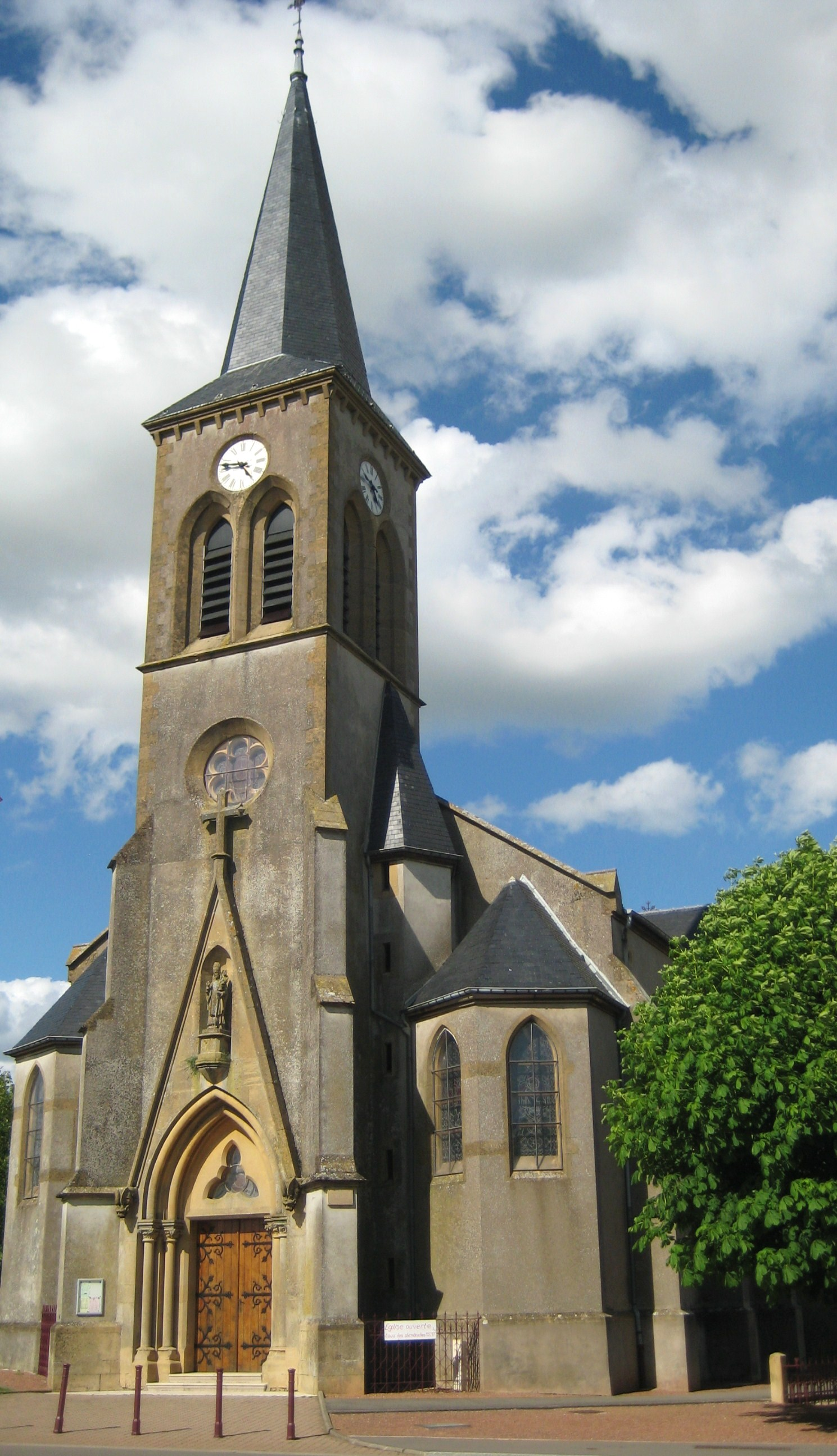 Description Église de Saint-Privat-la-Montagne Date18 May 2009Sourcemon appareil photoAuthorAimelaime Église de Saint-Privat-la-Montagne